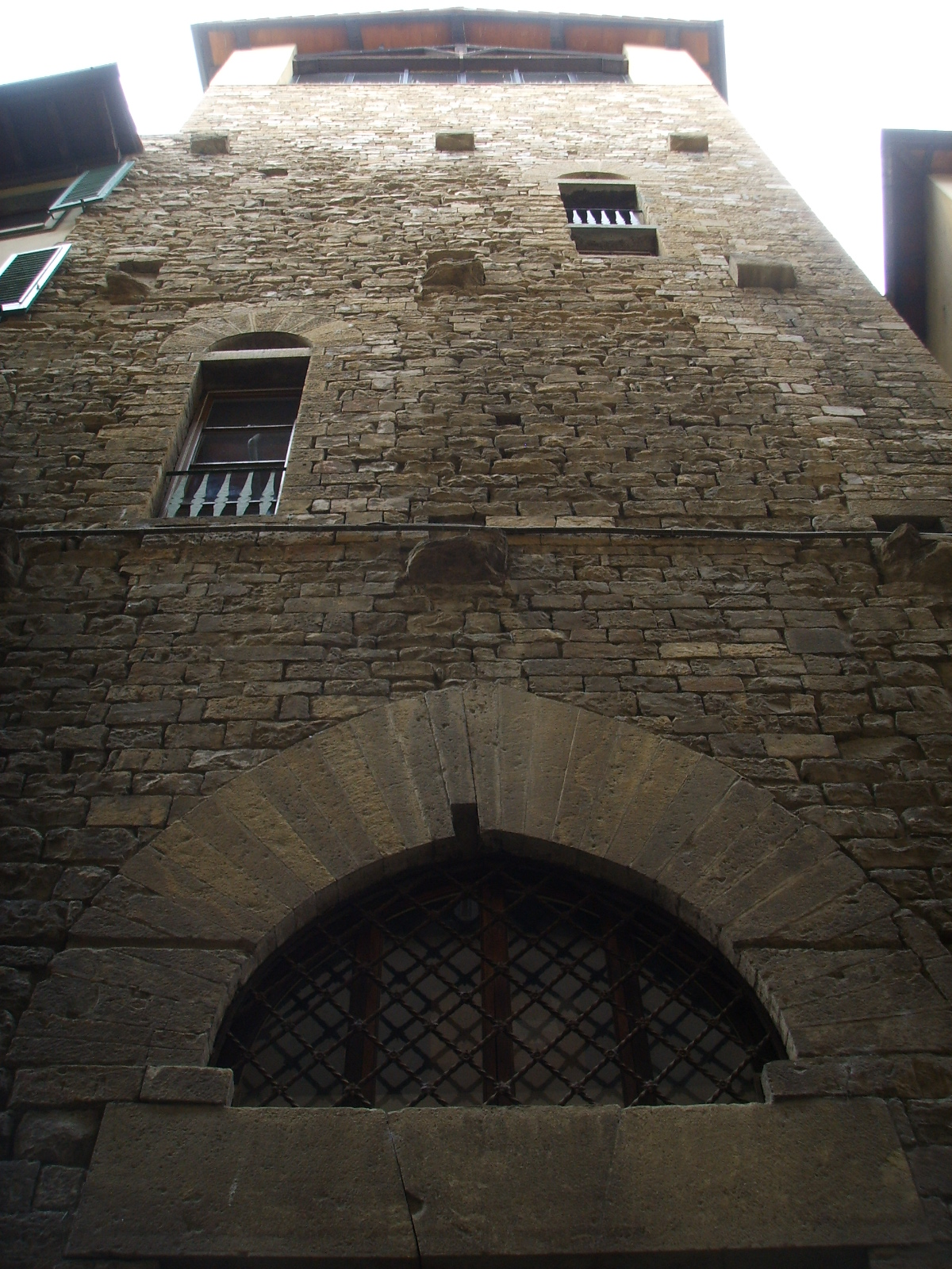 Torre dei Rigaletti view